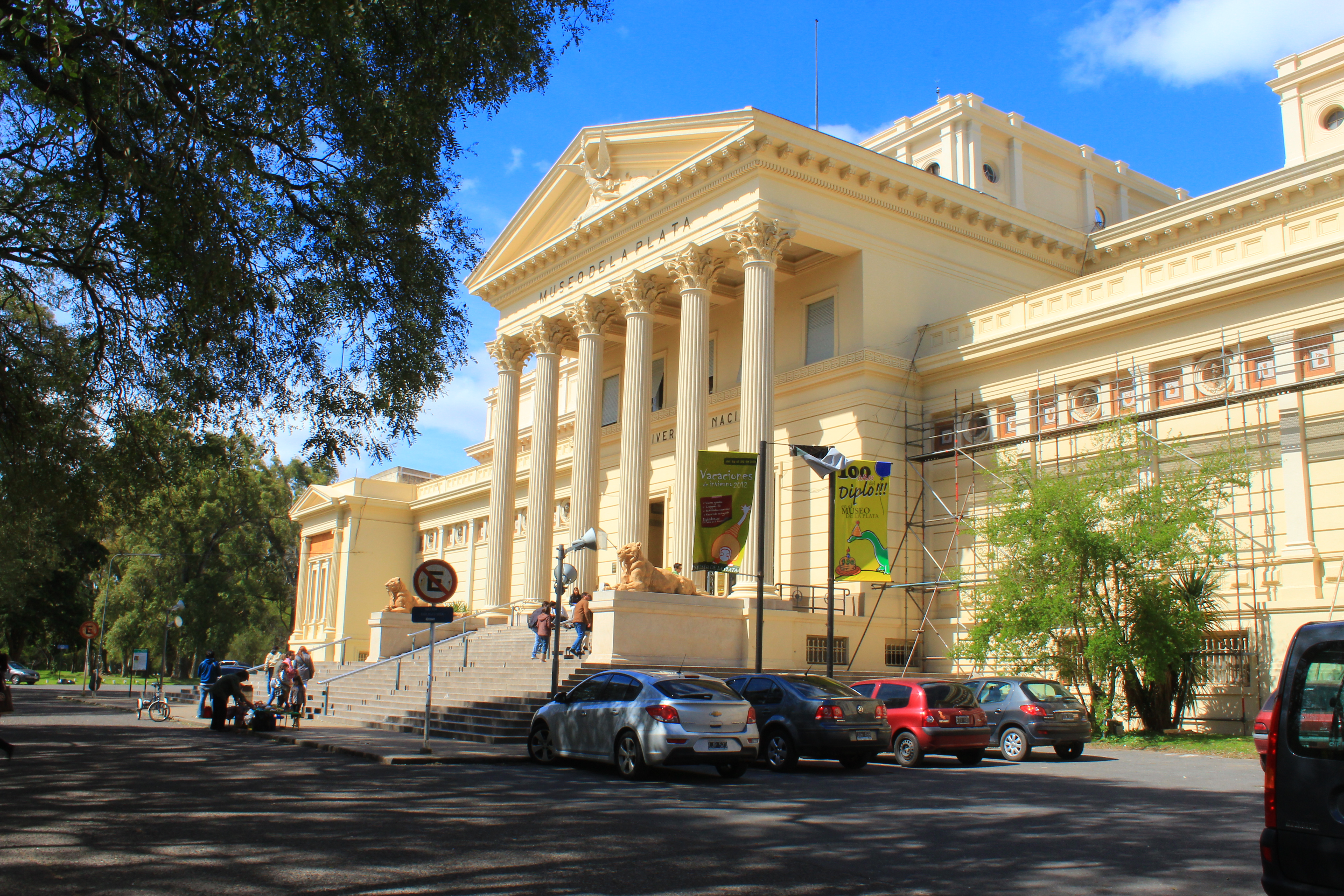 Museo de Ciencias Naturales